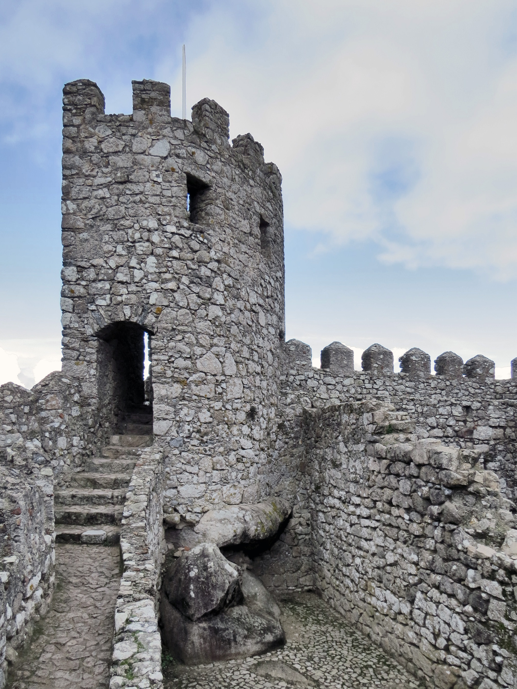 sintra, portugal janeiro de 2018